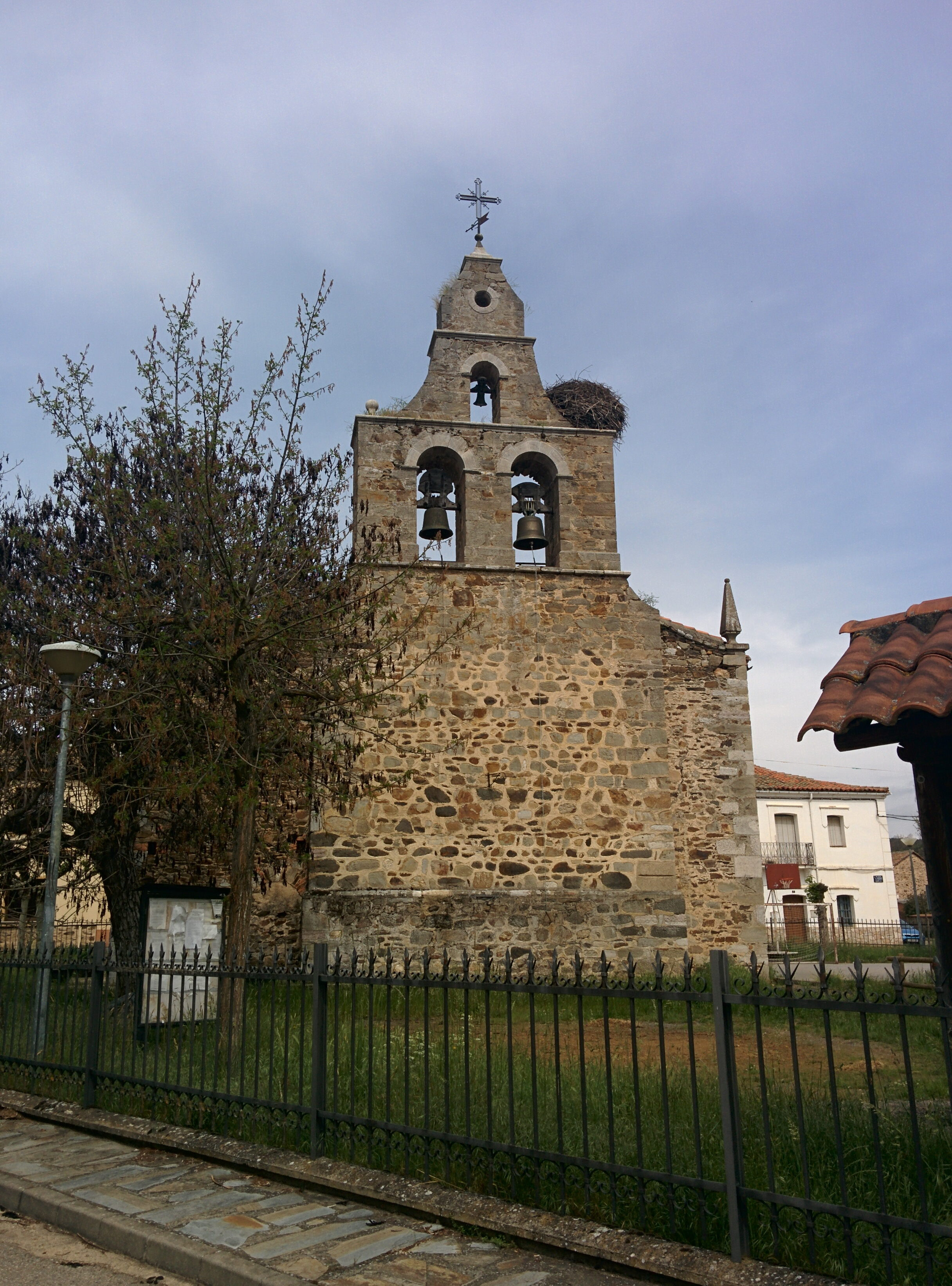 Iglesia de la Inmaculada Concepción, en Santa María de Ordás (León, España).